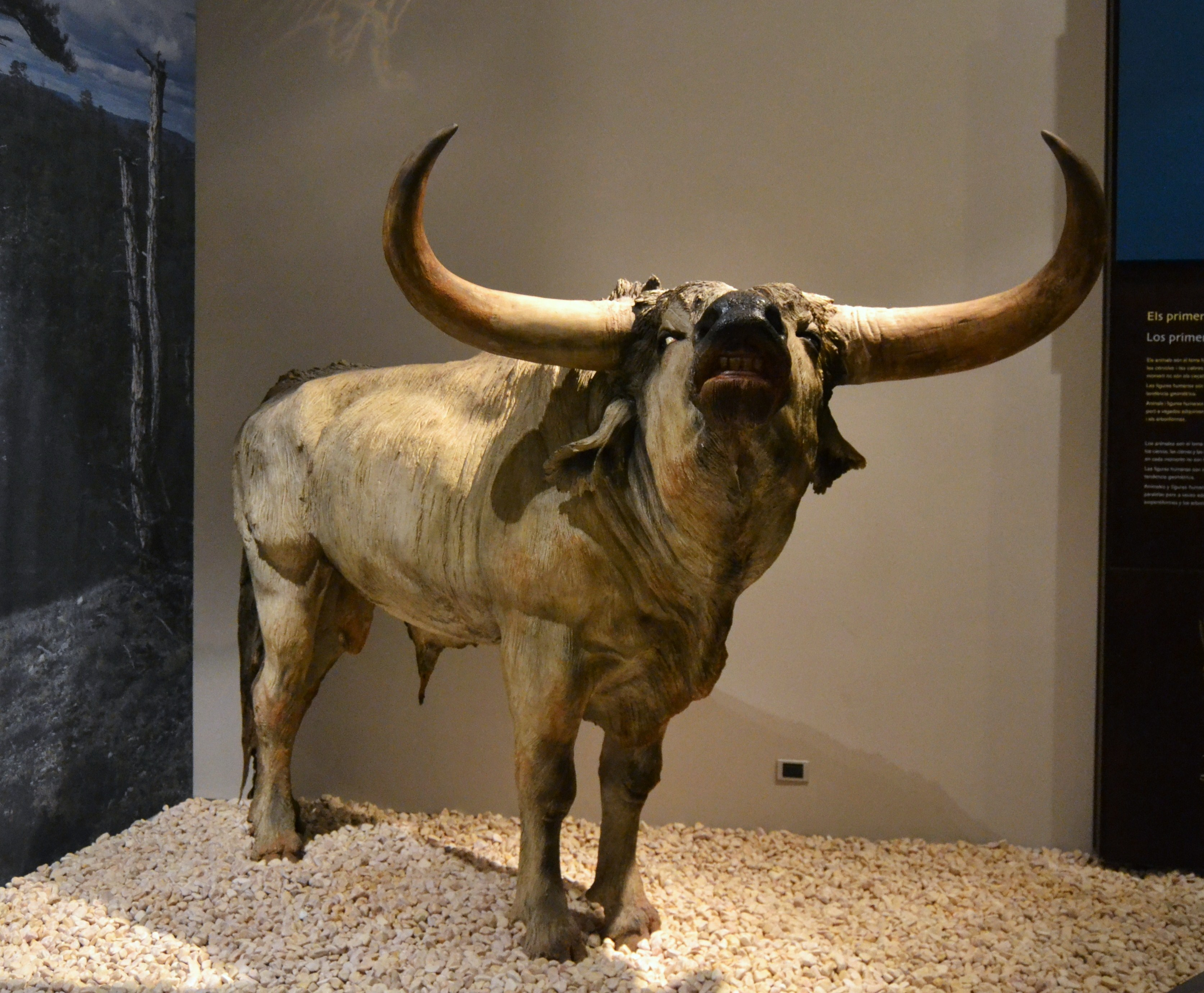 Reproducció a escala natural d'un ur (Bos taurus primigenius) al museu de la Valltorta.